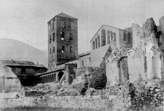 Fanatisme laic i anticatòlic. Ripoll 1835.